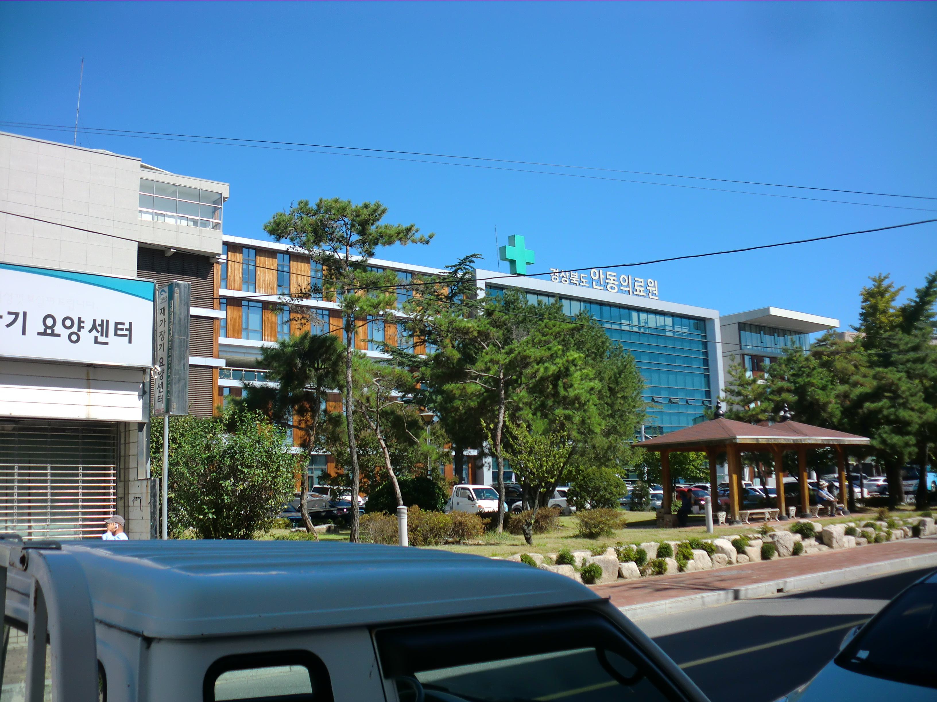 경상북도 안동시에 있는 안동의료원